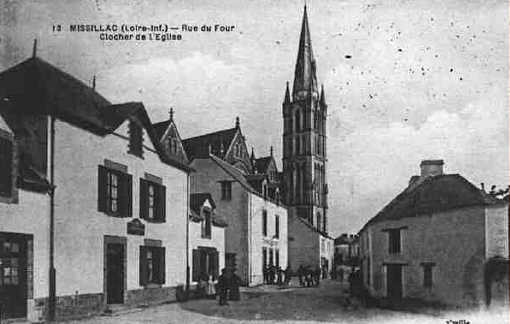 rue du four